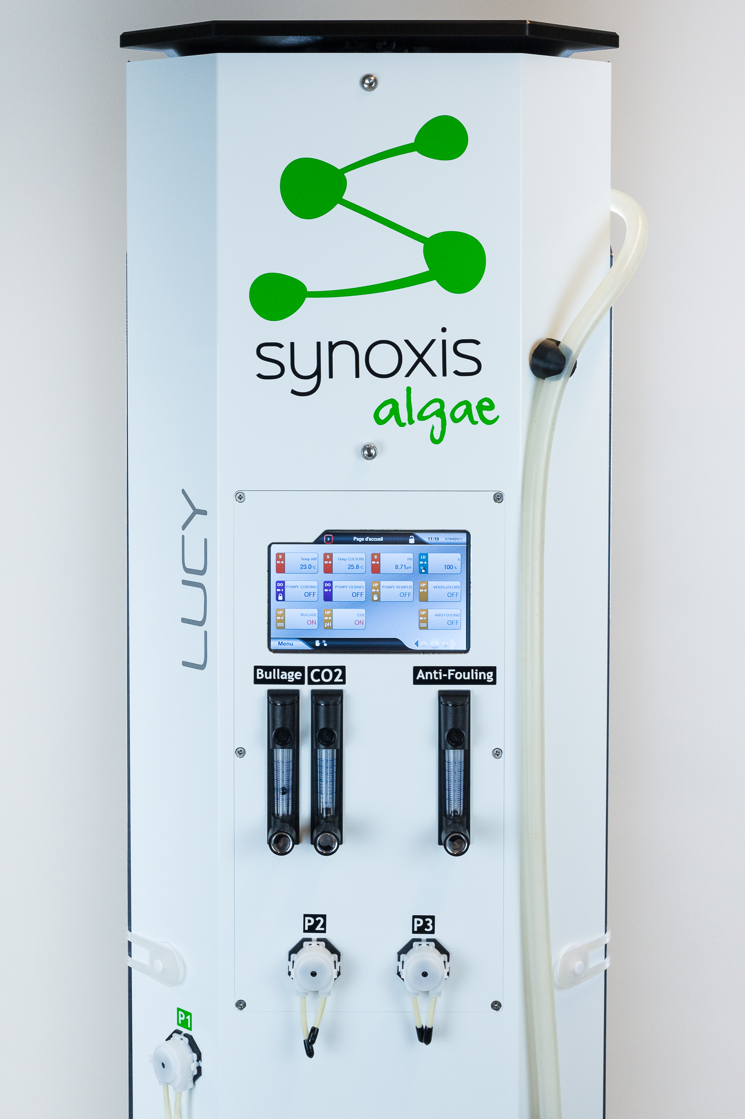 Photobioréacteur LUCY - Synoxis Algae